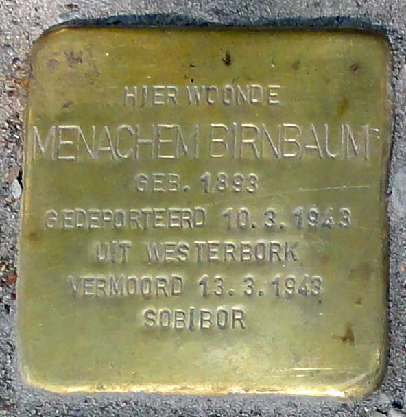 Stolpersteine - Lage Gouwe 34 - Menachem Birnbaum